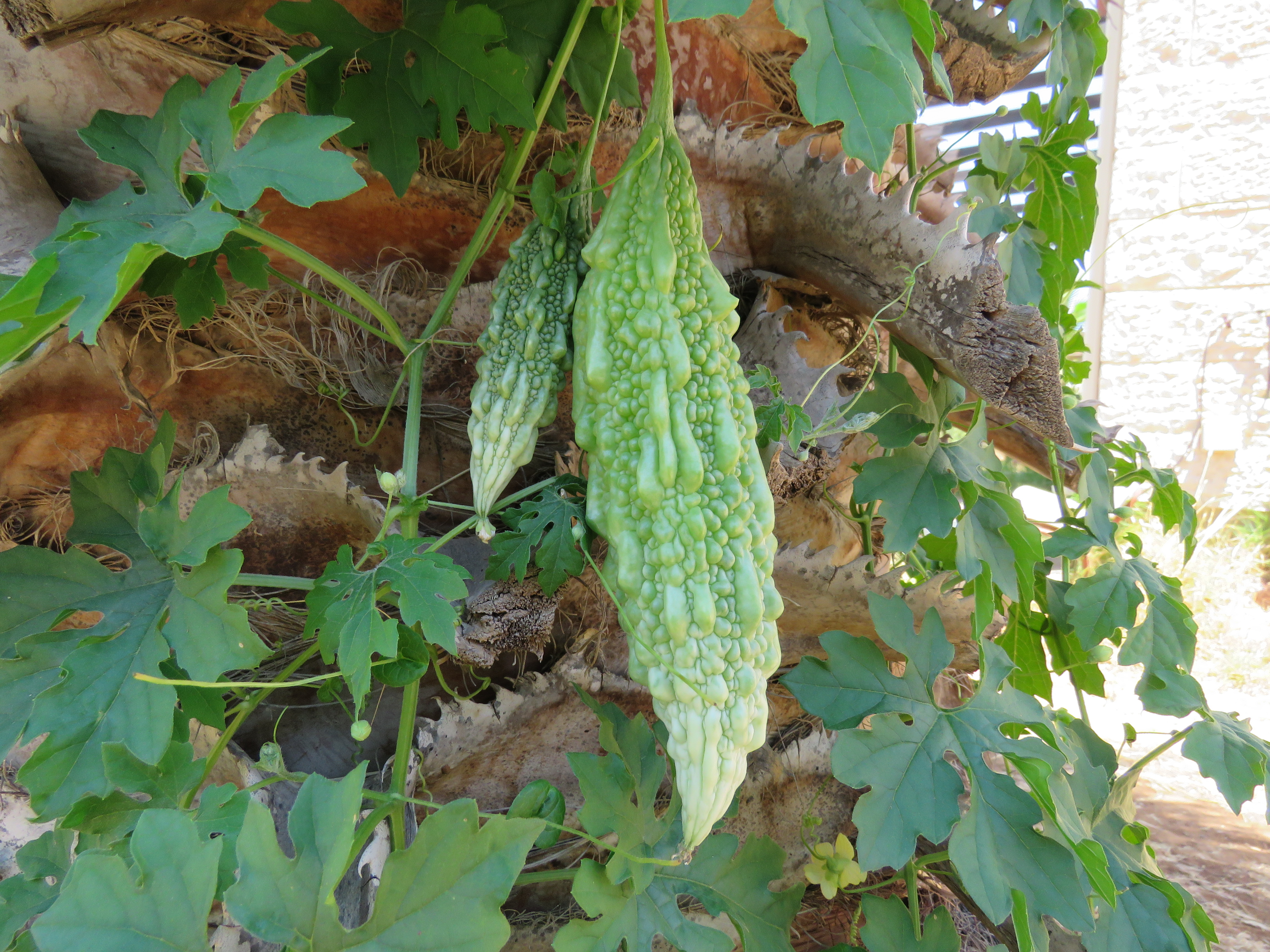 שני פרות של מלון מר